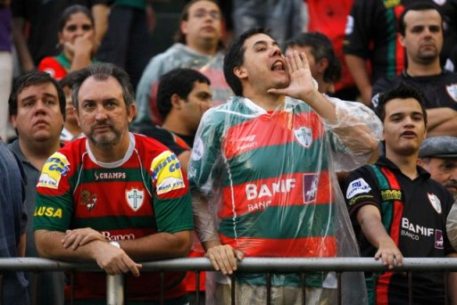 Torcedores da Portuguesa de Desportos no Canindé em 2010.